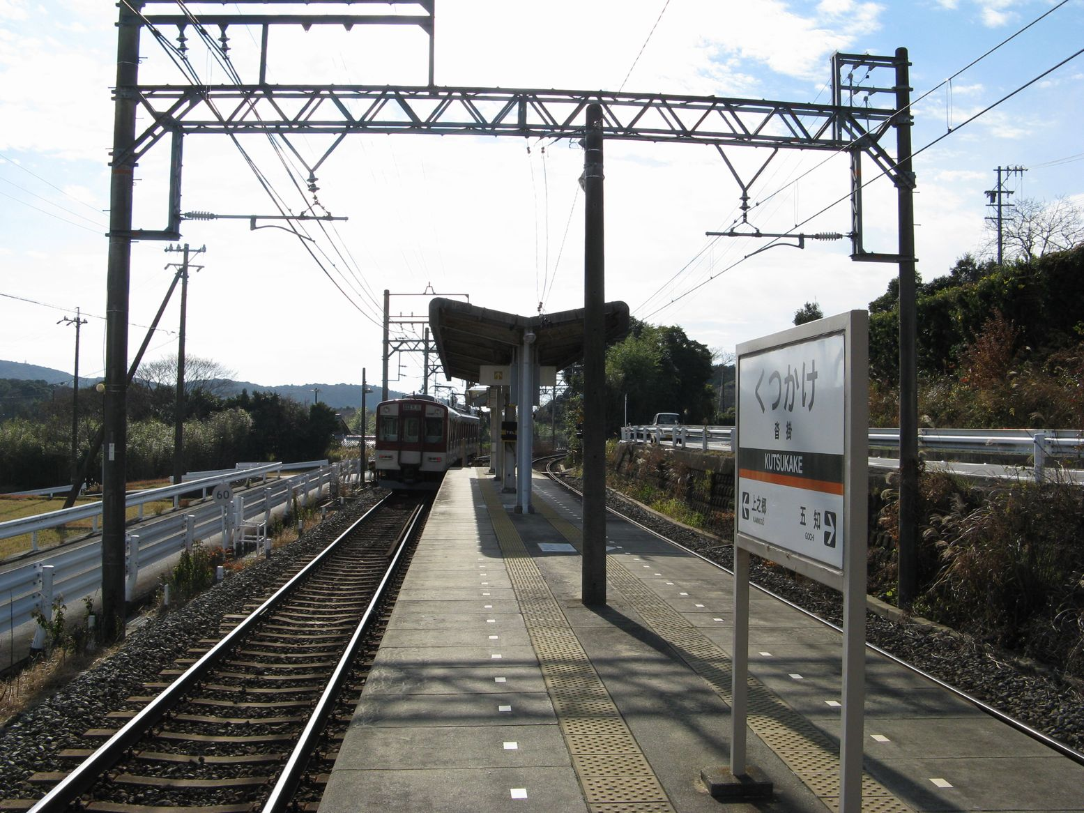 近鉄志摩線沓掛駅 構内からホームを南望 2006年12月29日 Bakkai撮影